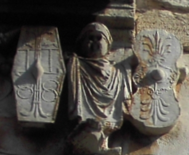 Trophäe vom Grabmal der Caecilia Metella in Rom. Licensing